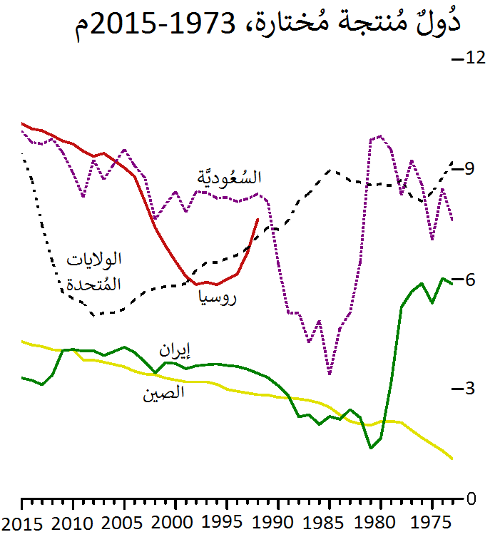 رسمٌ بياني يُظهر إنتاج أكبر 5 دُول نفطيَّة من سنة 1975م إلى سنة 2015م، بِمليارات البراميل.